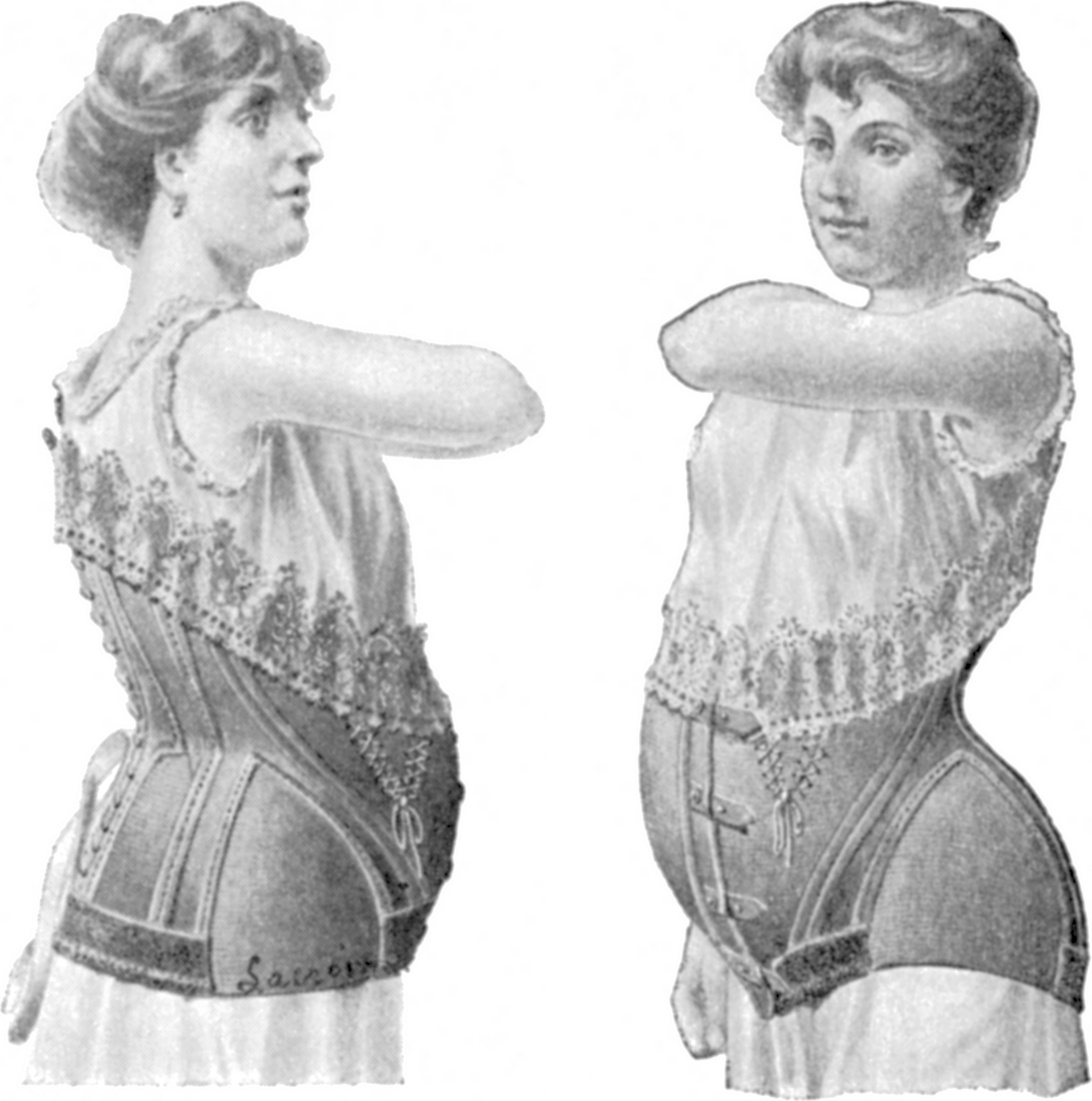 Fig. 110. — Corset-ceinture du Dr Olivier, par Lacroix